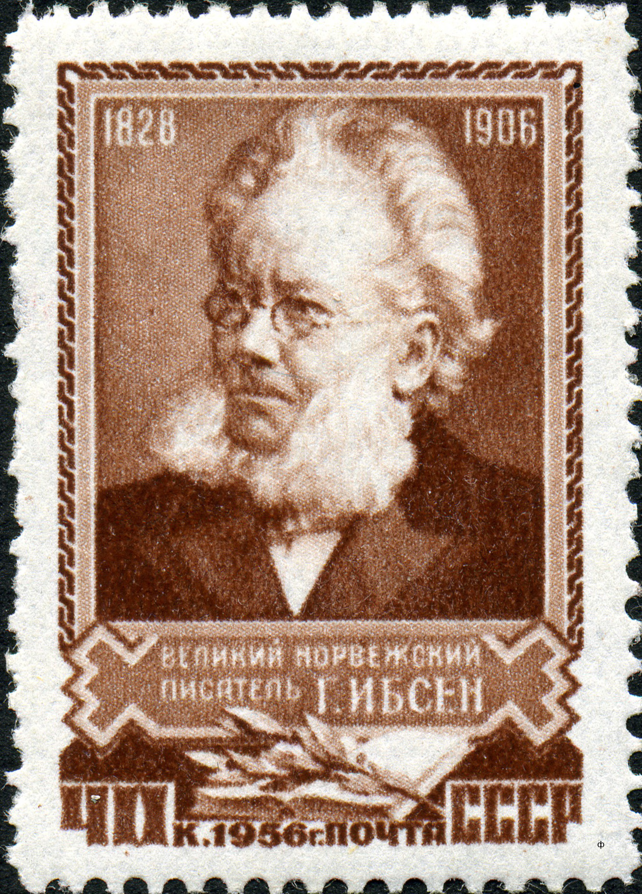 Марка СССР